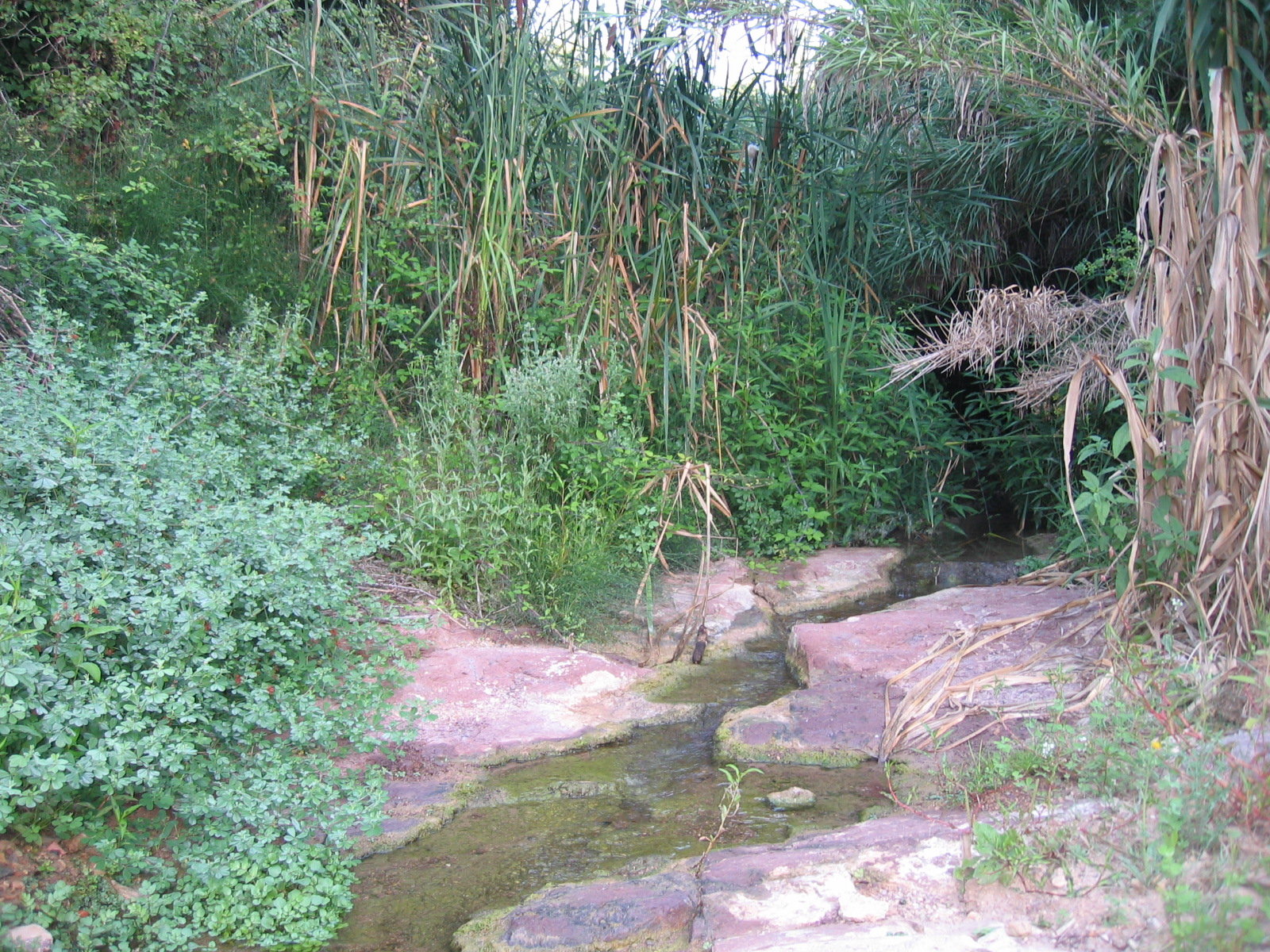 Curs d'aigua superficial. Torrent de l'Aguilera (Bonastre)